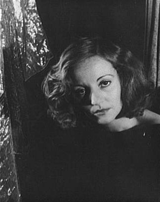 Tallulah Bankhead, January 25, 1934